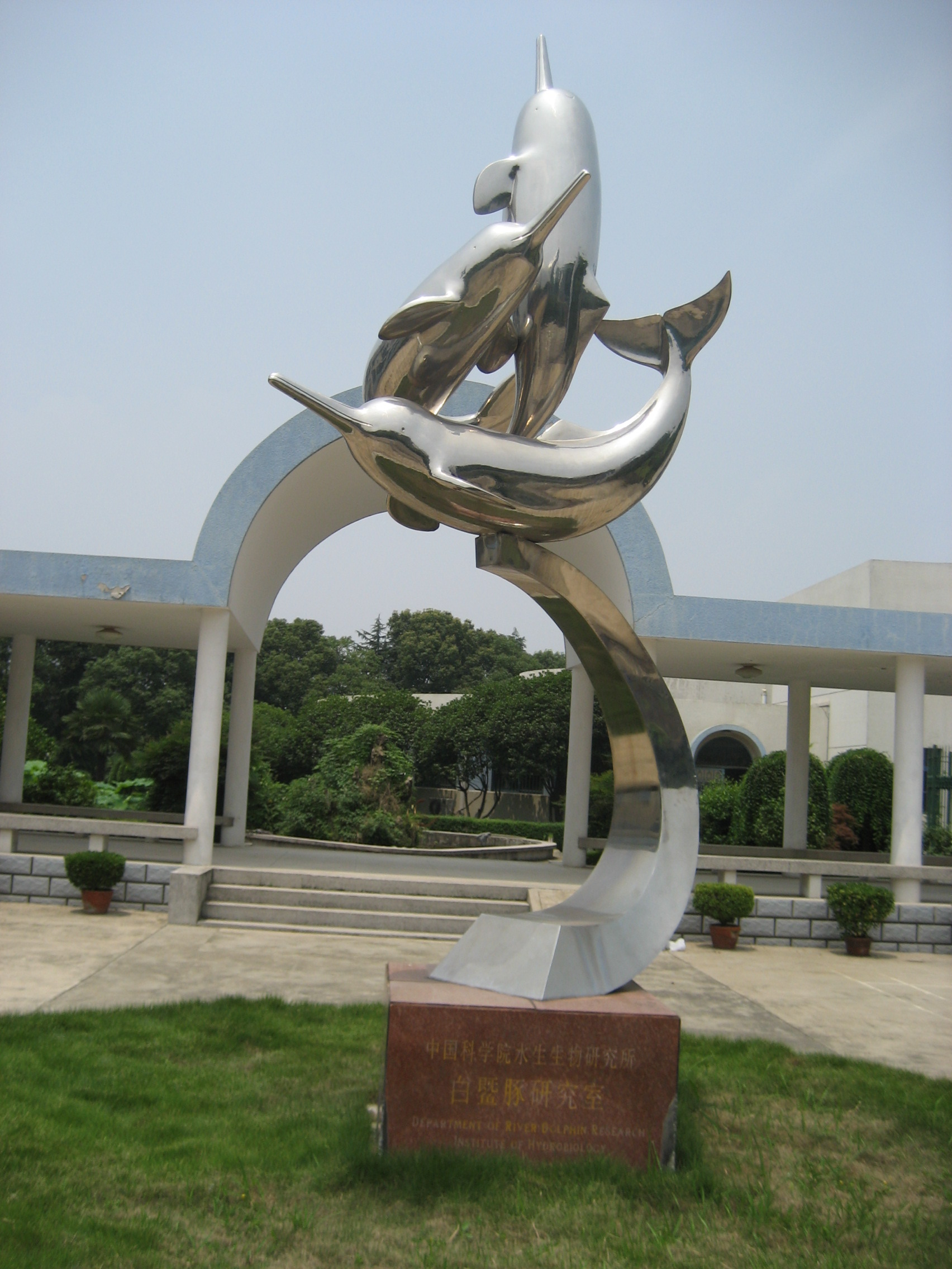 水生生物研究所の入口にあったモニュメント